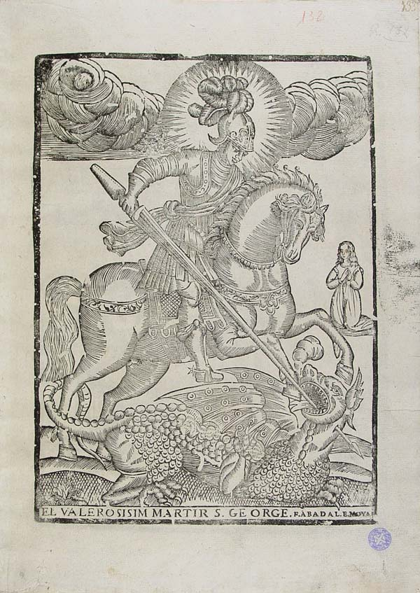 El valerosisim. martir s. george. P. Abadal F. Moya. Xilografía, Àlbum de mostres Abadal